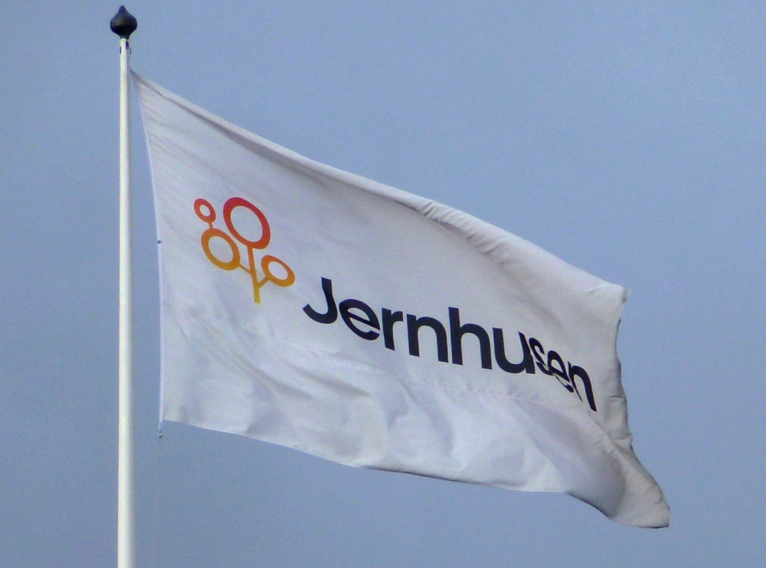 Jernhusen flagga på Stockholms central